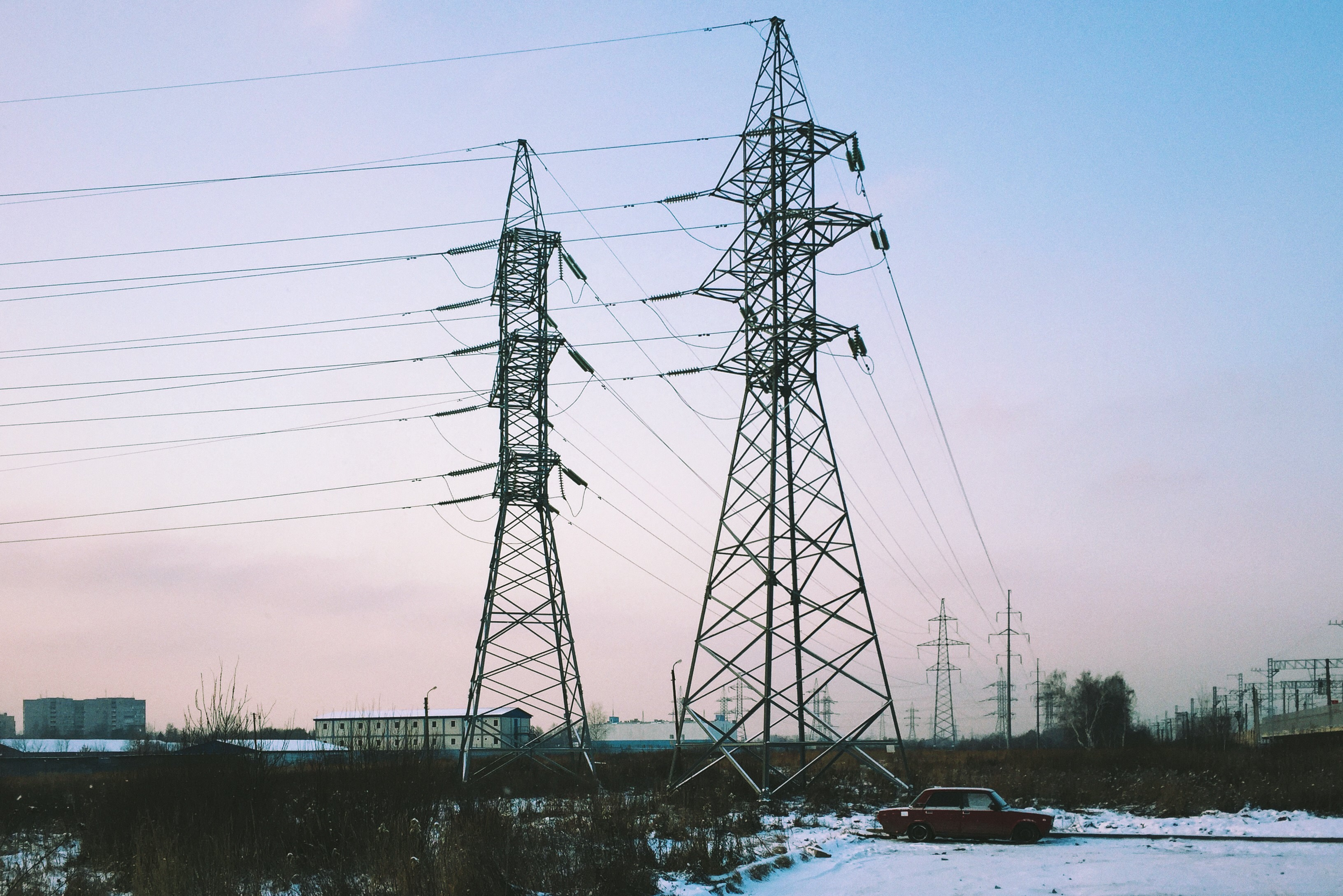 Молжаниновский район. Старофилинская улица. Парковка у ж-д платформы "Планерная" Ленинградского направления.